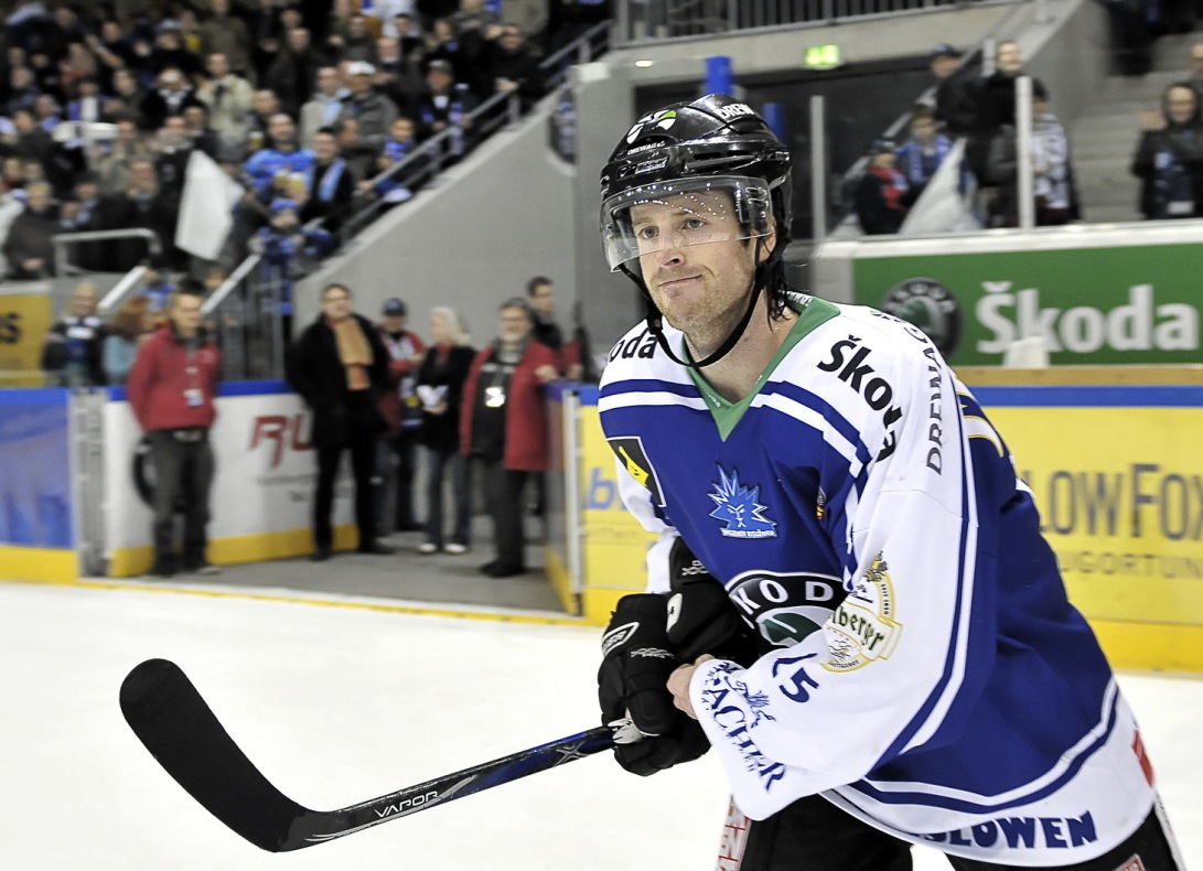 Kevin Gardner, Dresdner Eislöwen, January 2009